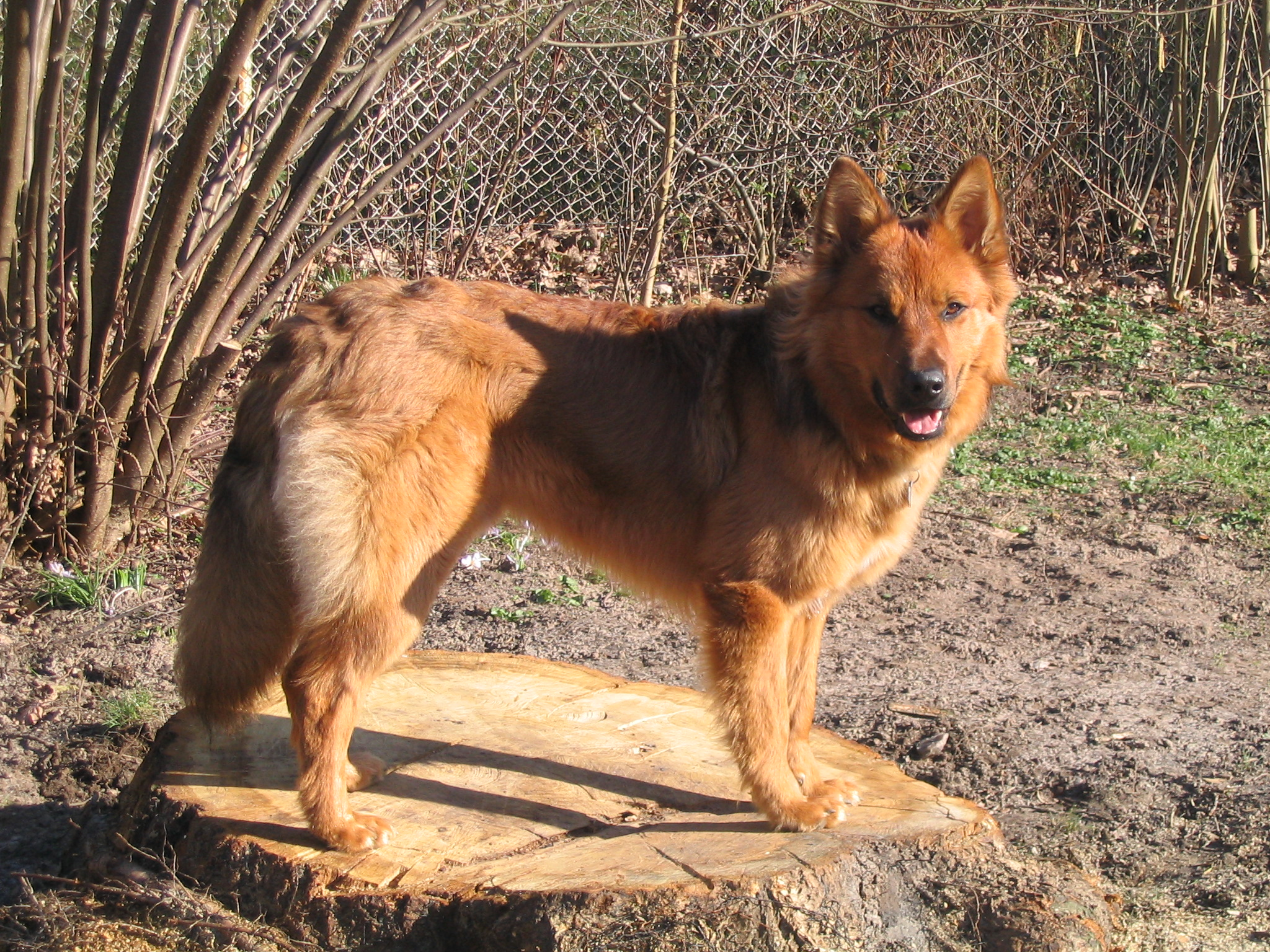 Harzer Fuchs (Rüde), 1 Jahr alt